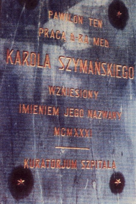 Karszym 2